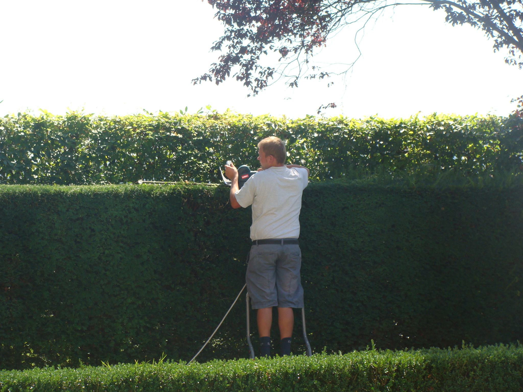 Nyírják a füvet a melki apátságnál.